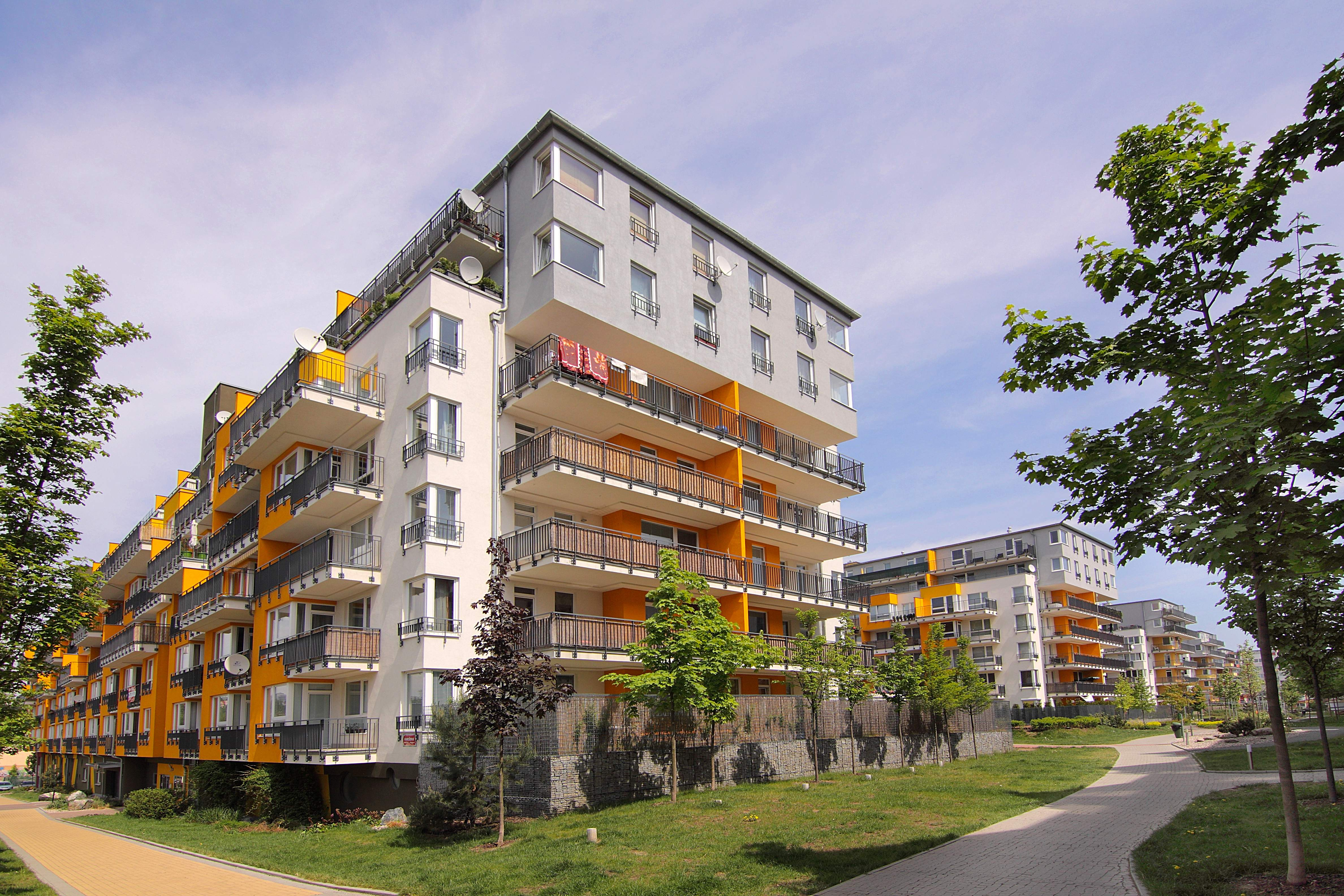 Nova Harfa III